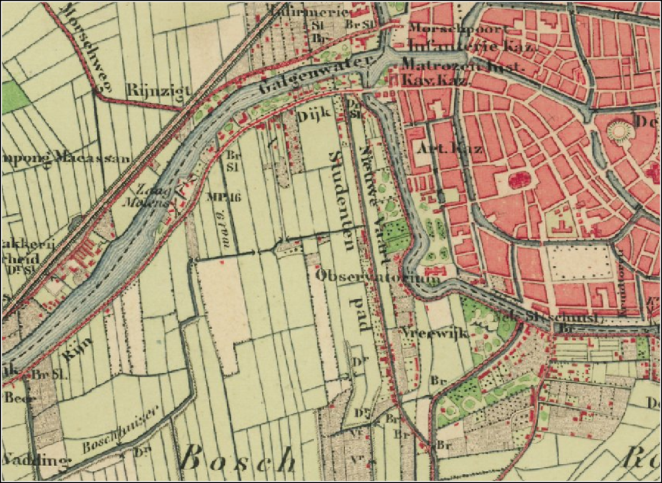 De Vreewijk en omgeving, Leiden, 1876